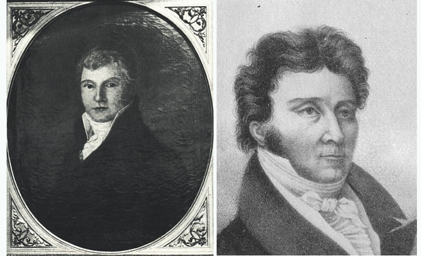 Portrait des deutschen Publizisten Johann Christoph Freiherr von Aretin.